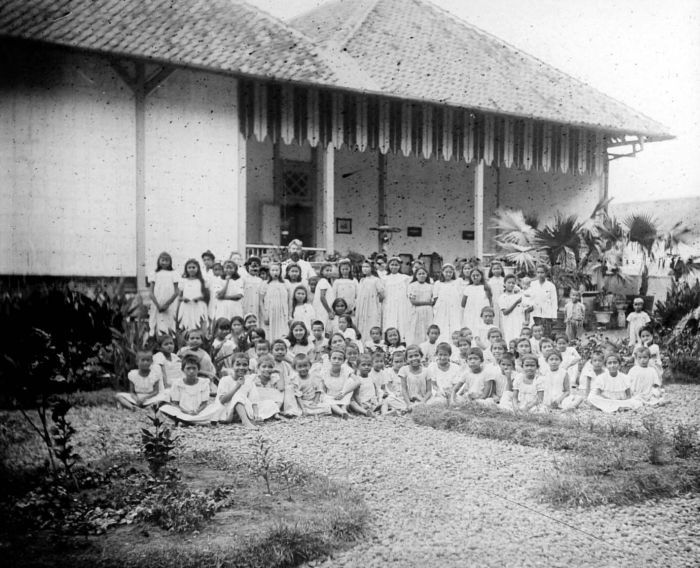 Repronegatief. De meisjesspeelplaats van het tehuis Stichting 'Oranje Nassau', gesticht door vader Van der Steur te Magelang, Java, voor de opvang van soldatenkinderen